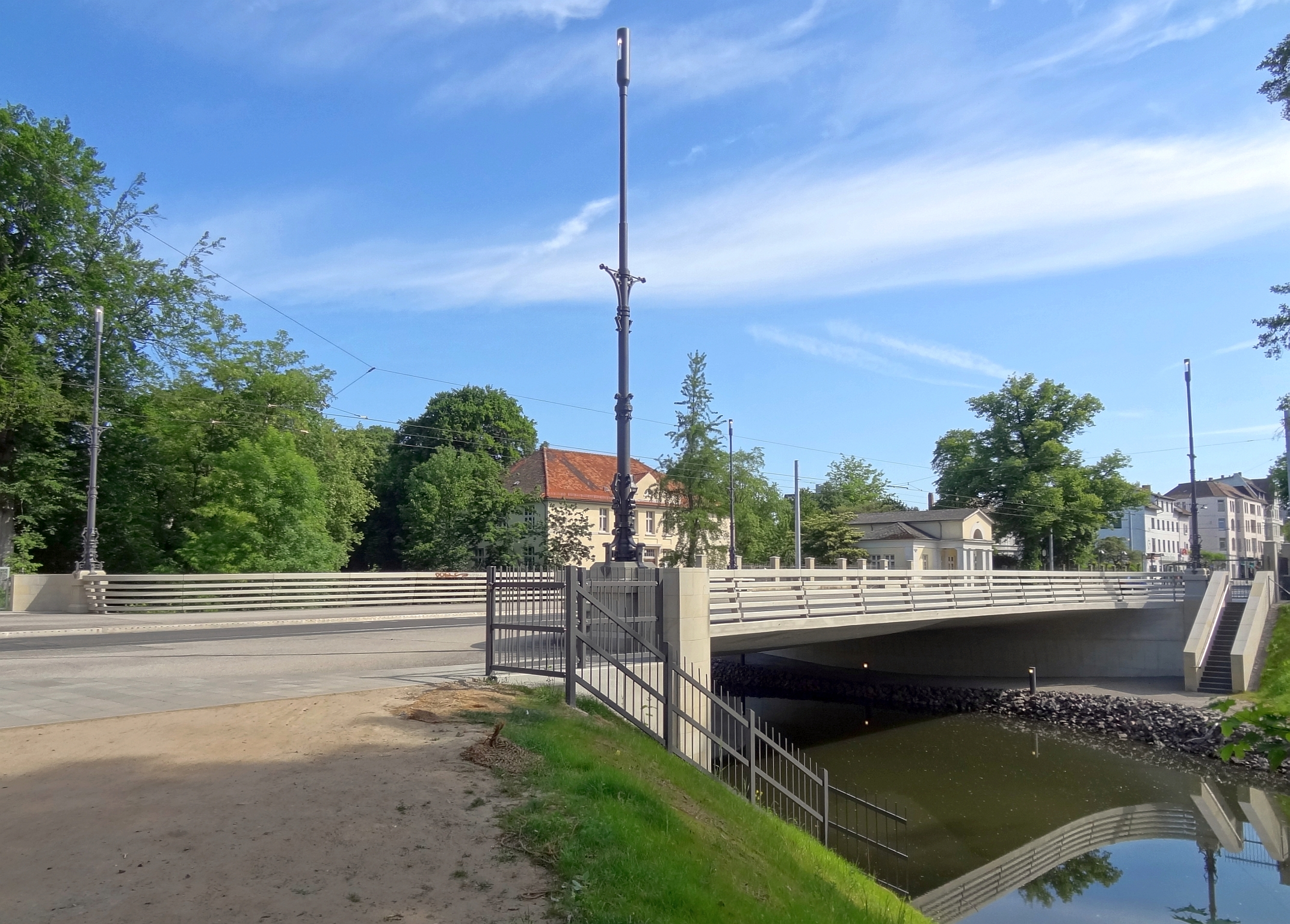 Neue Fallerslebertor-Brücke im Mai 2012.